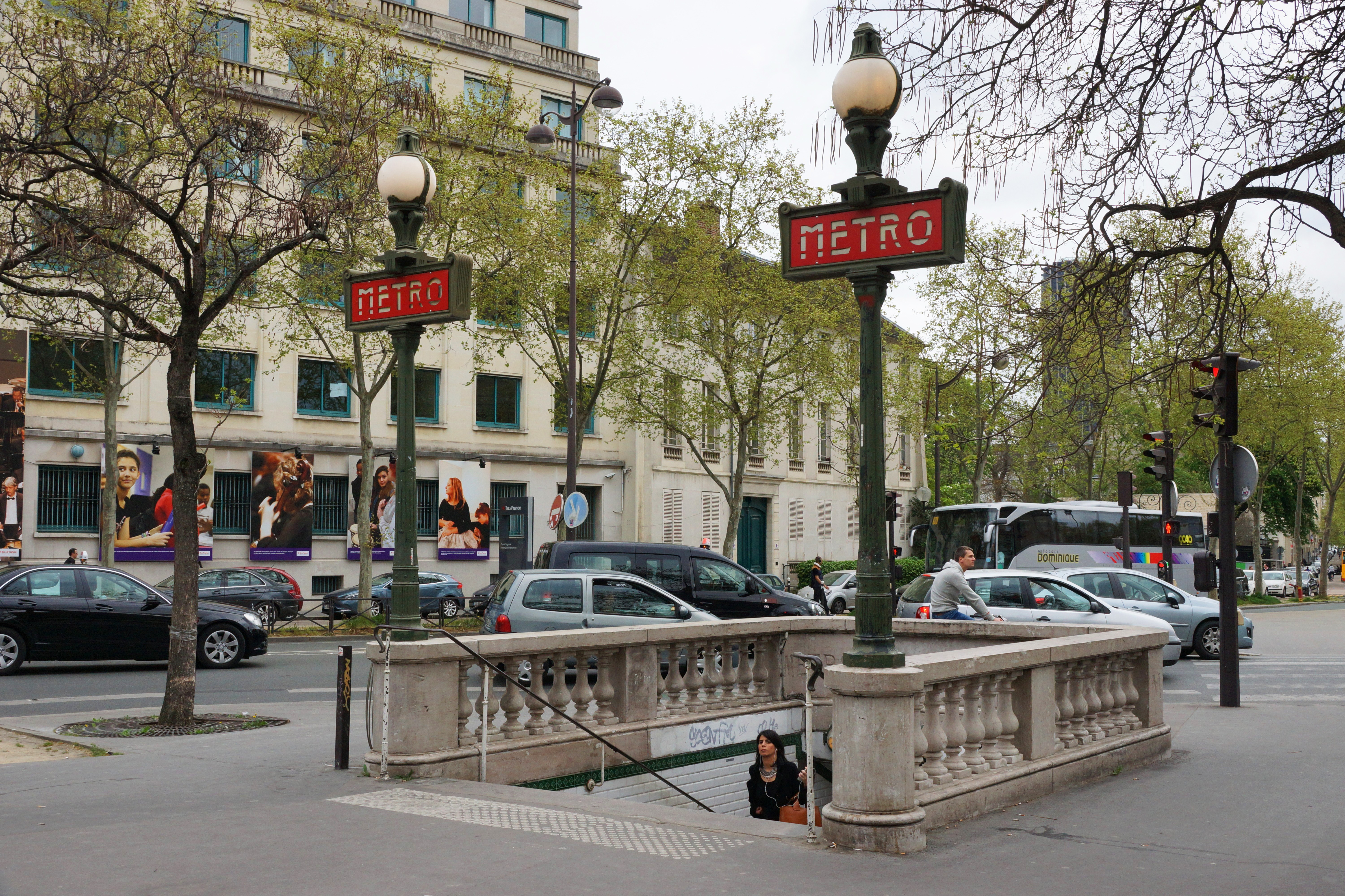 Saint-François-Xavier metro station, Paris.